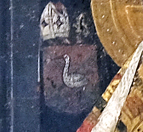 Détail (partie haute, à gauche) représentant les armes (blason) du chapitre Saint-Agricol .